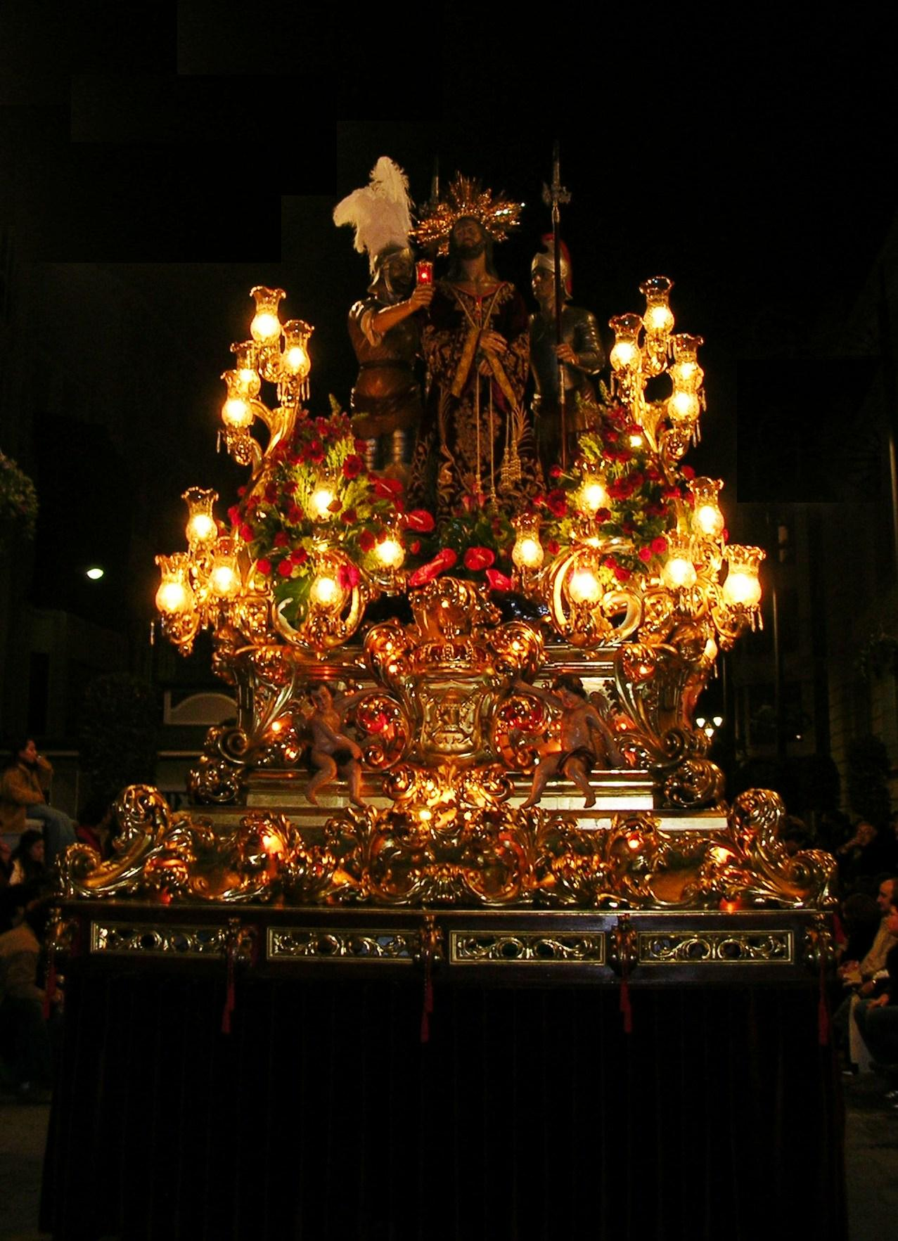 Trono del Prendimiento, Californios (Cartagena)